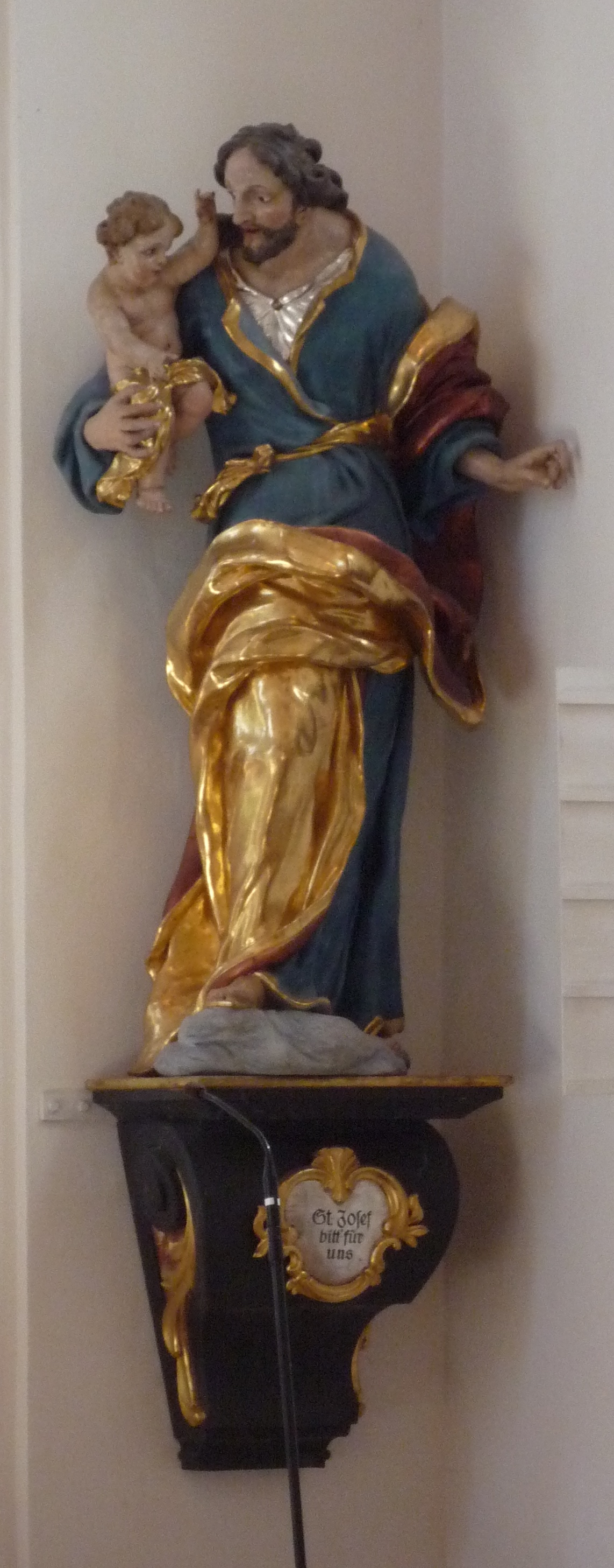 Saint Joseph, Détail de l’église Saint George et Saint Nicolas de Oetz